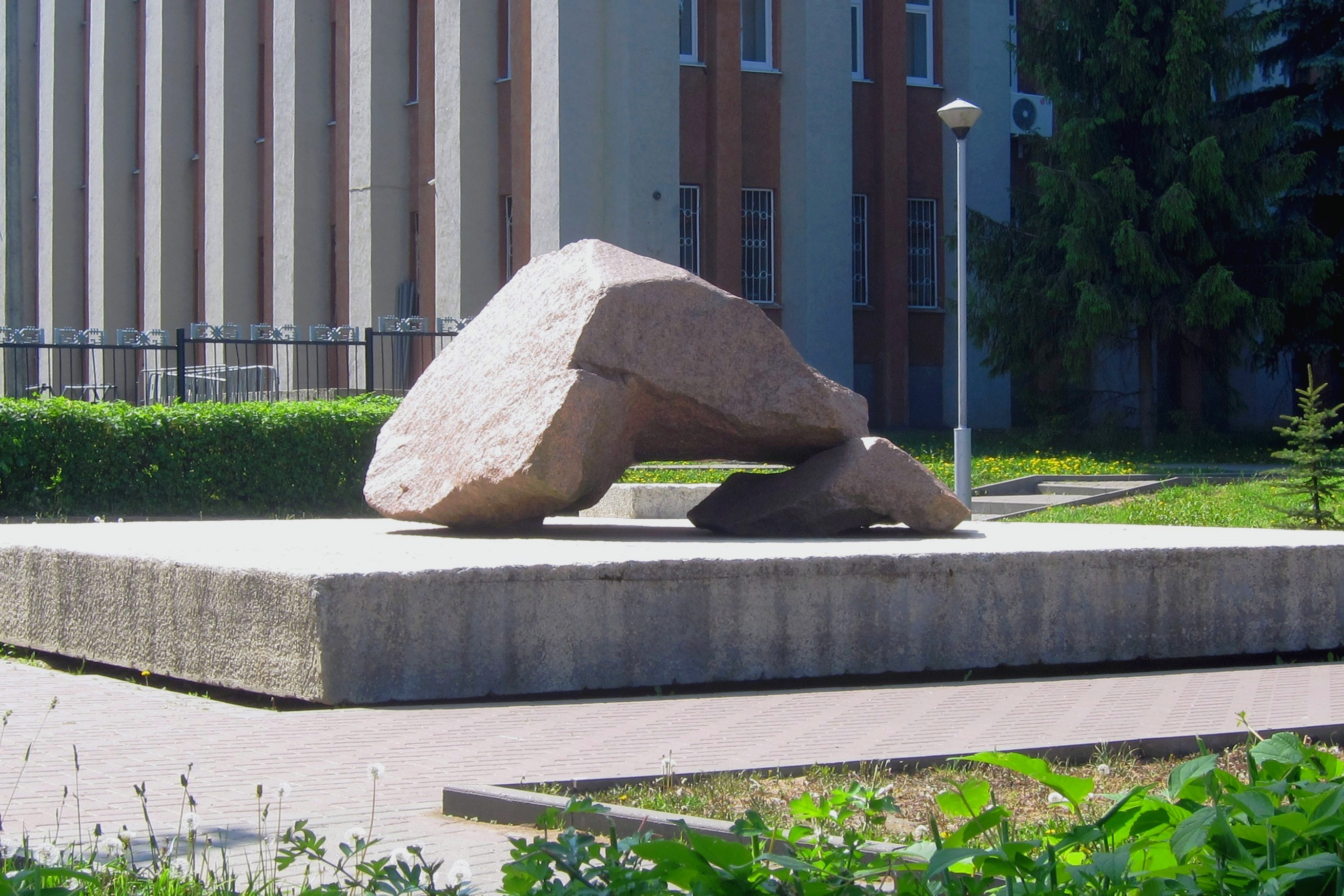 Памятный камень на месте, где стоял дом, в котором родился В.И. Чапаев (деревня Будайка, ныне - город Чебоксары)